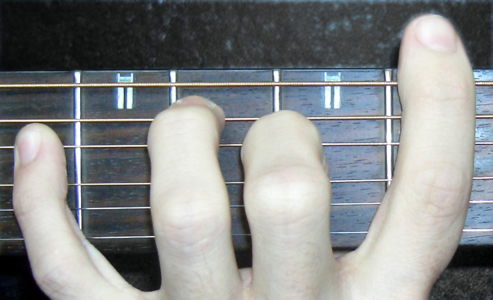 Bilden föreställer ett "barré-ackord", närmare bestämt G#2.